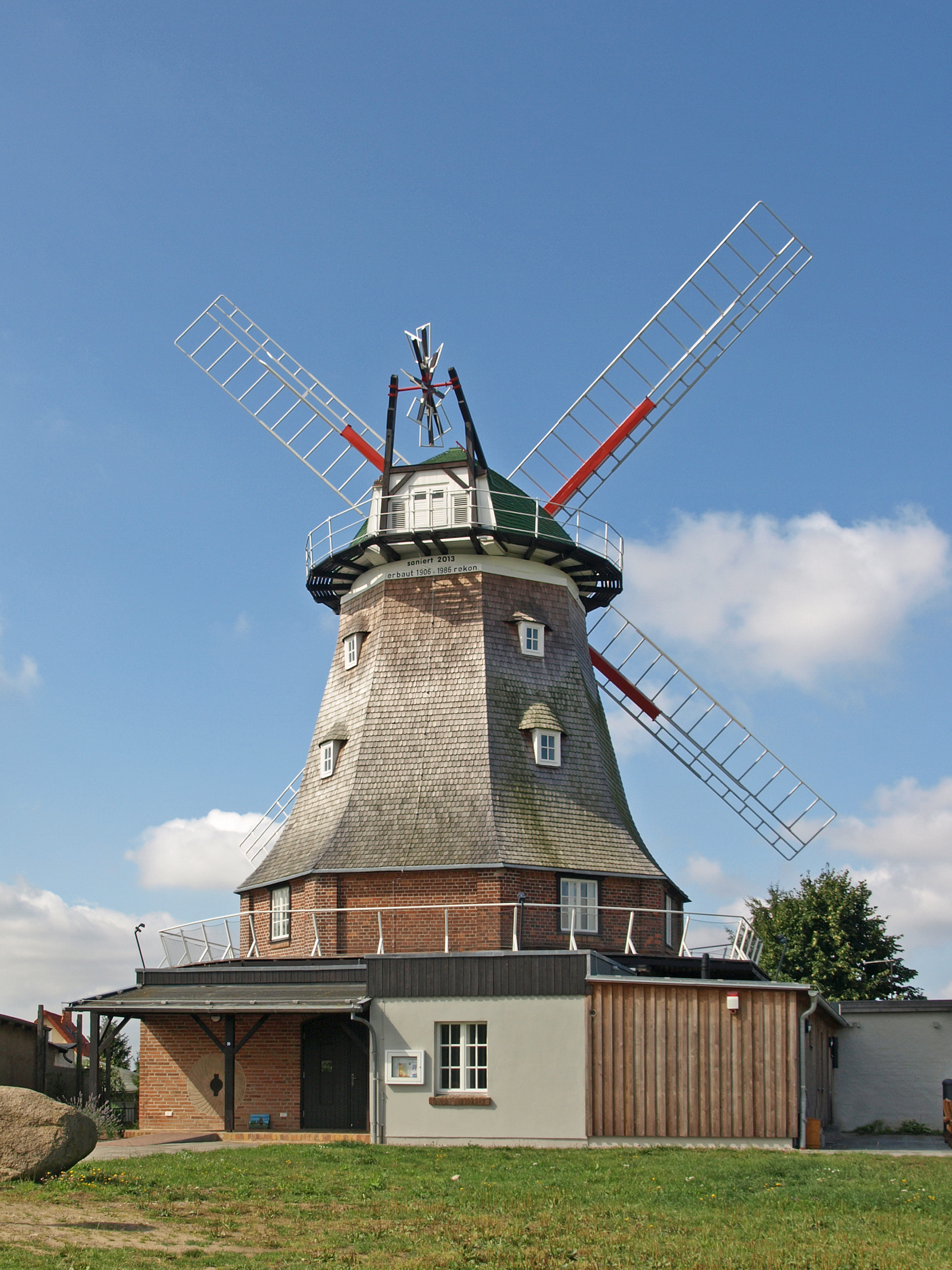 Windmühle in Kröpelin